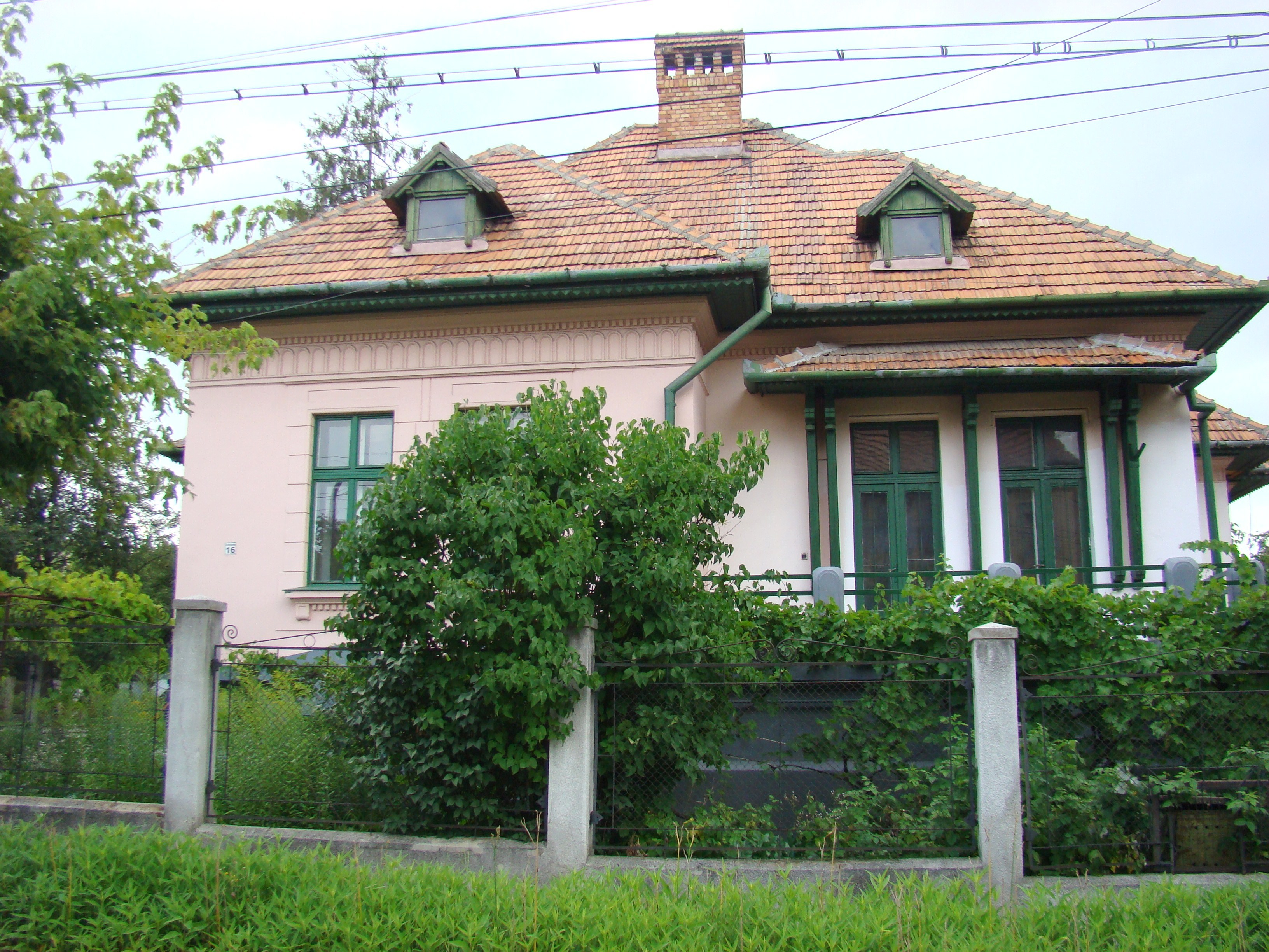 Clădire monument istoric, str.Dimitrie Bolintineanu, nr.16 (Casa în care a locuit Alexandru Lapedatu)